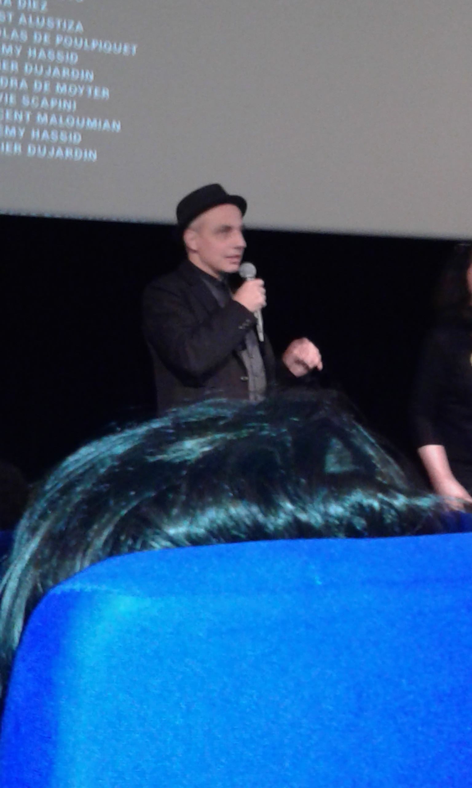 Le réalisateur Pablo Berger à l'avant-première de son film Abracadabra au cinéma Le Zola à Lyon le 20 mars 2018